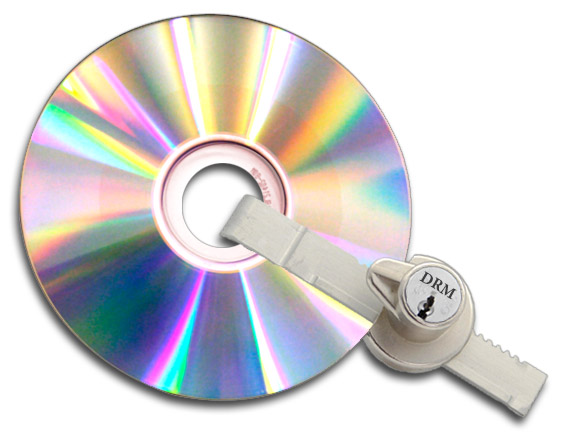 DRM által védett lemez.